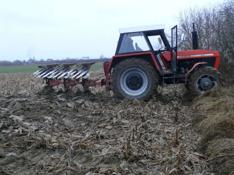 Ursus 914 podczas orki